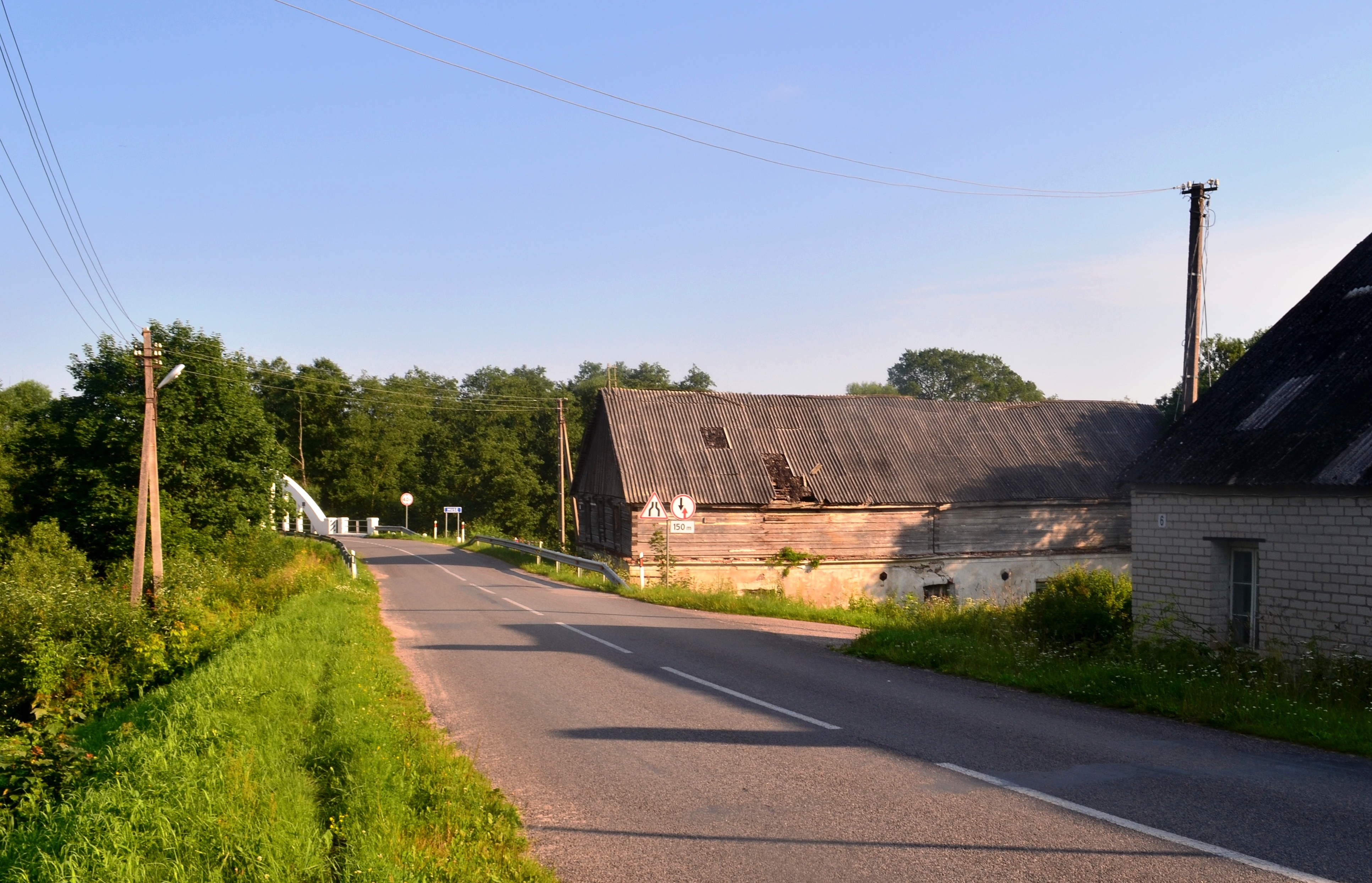 Čiobiškis, Širvintų raj.